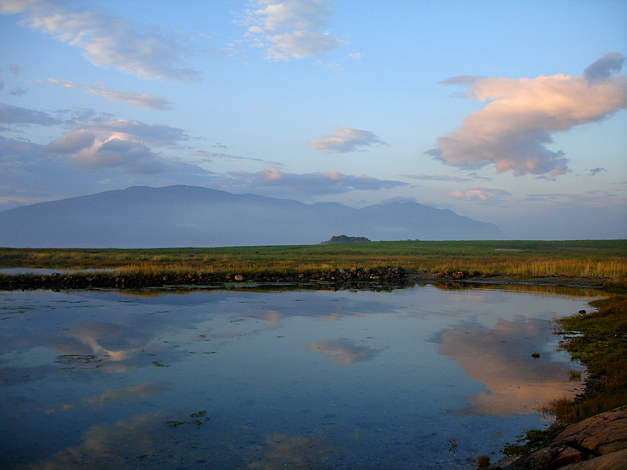 Mindlandet